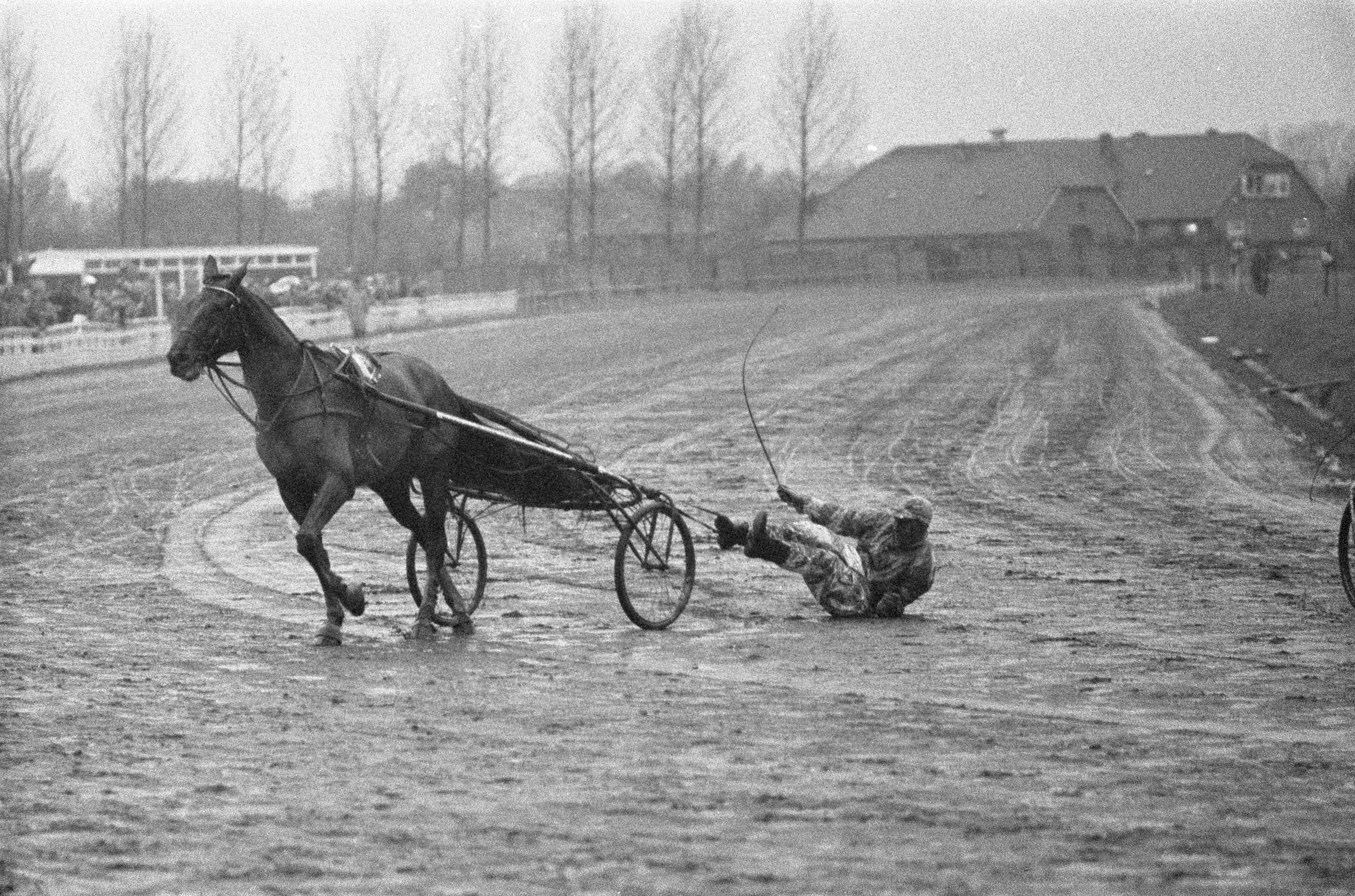 Collectie / Archief : Fotocollectie Anefo Reportage / Serie : [ onbekend ] Beschrijving : Draverijen op Mereveld, Theo Massidor gooit rijder Frank Eerenberg in de modder Datum : 30 oktober 1960 Trefwoorden : DRAVERIJEN, rijders Persoonsnaam : Geersen Fotograaf : Pot, Harry / Anefo Auteursrechthebbende : Nationaal Archief Materiaalsoort : Negatief (zwart/wit) Nummer archiefinventaris : bekijk toegang 2.24.01.05 Bestanddeelnummer : 911-7274 Reacties Geplaatst door Pvtvelt op 15 mei 2011 - 14:36. Dit is niet Willem geersenmaar Freek eerenberg zijn tweede pikeur